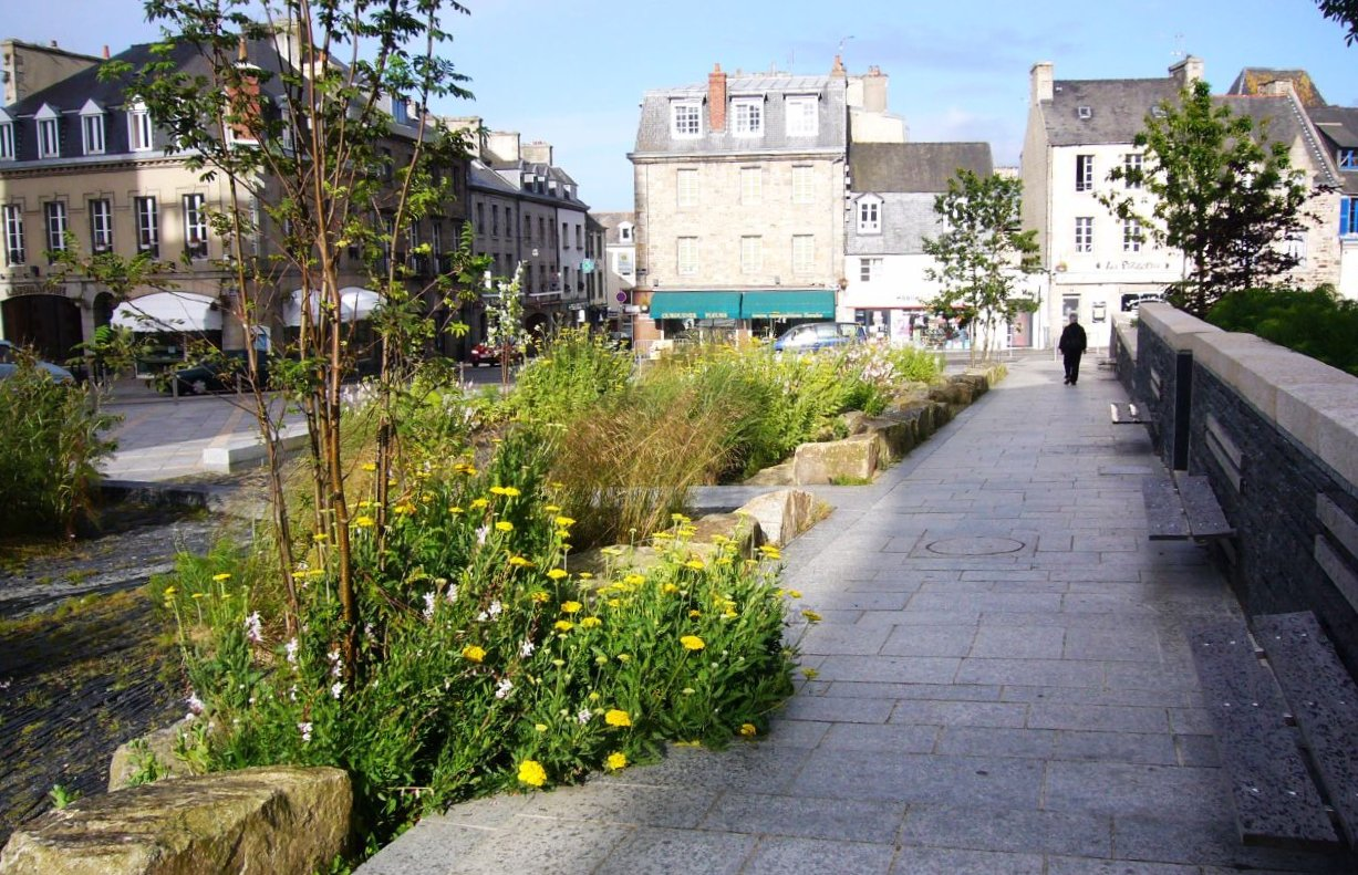 St Pol de Léon, jardin d'eau autour du parvis de la cathédrale